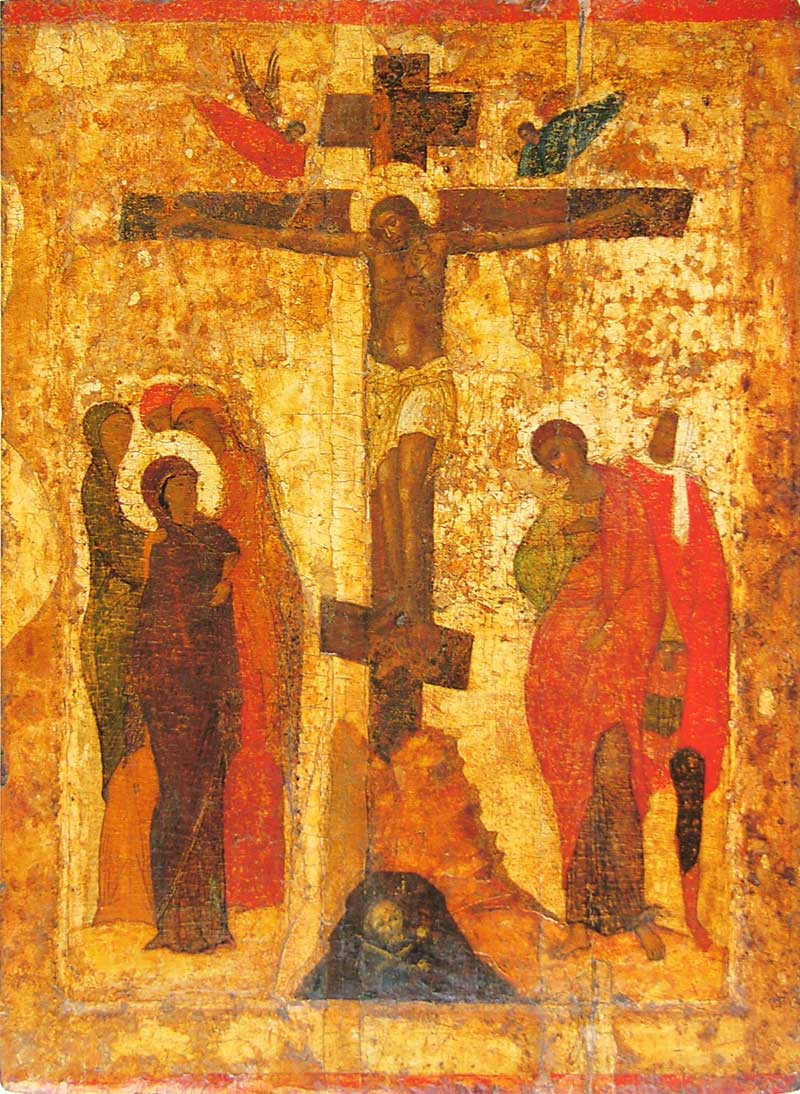 Троицкий собор Троице-Сергиевой Лавры. Праздничный чин